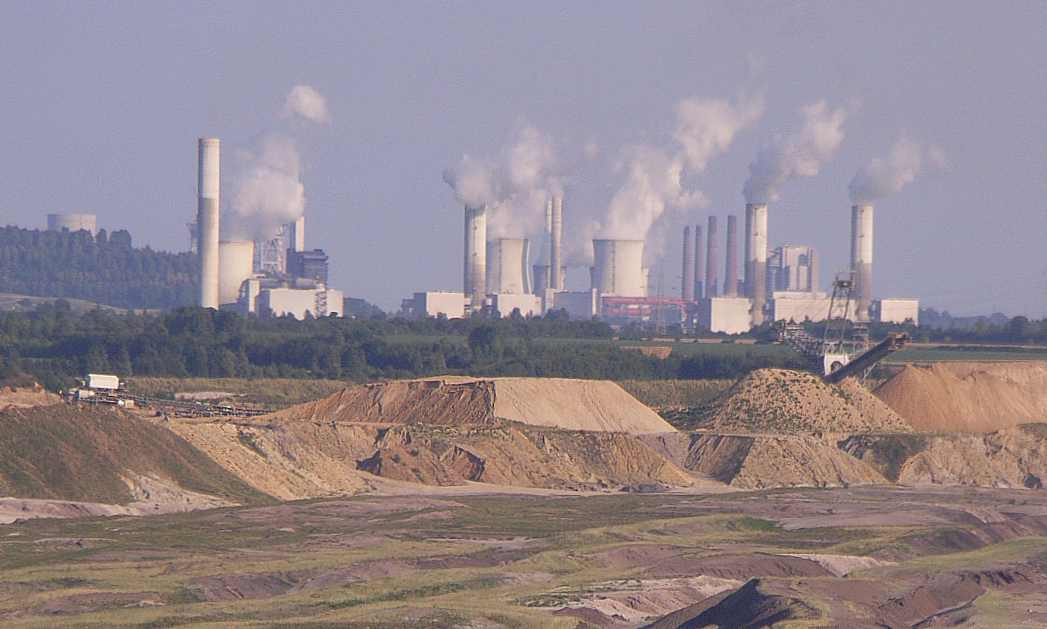 Braunkohlekraftwerk Frimmersdorf, NRW - Powerstation Frimmersdorf, Germany, NRW